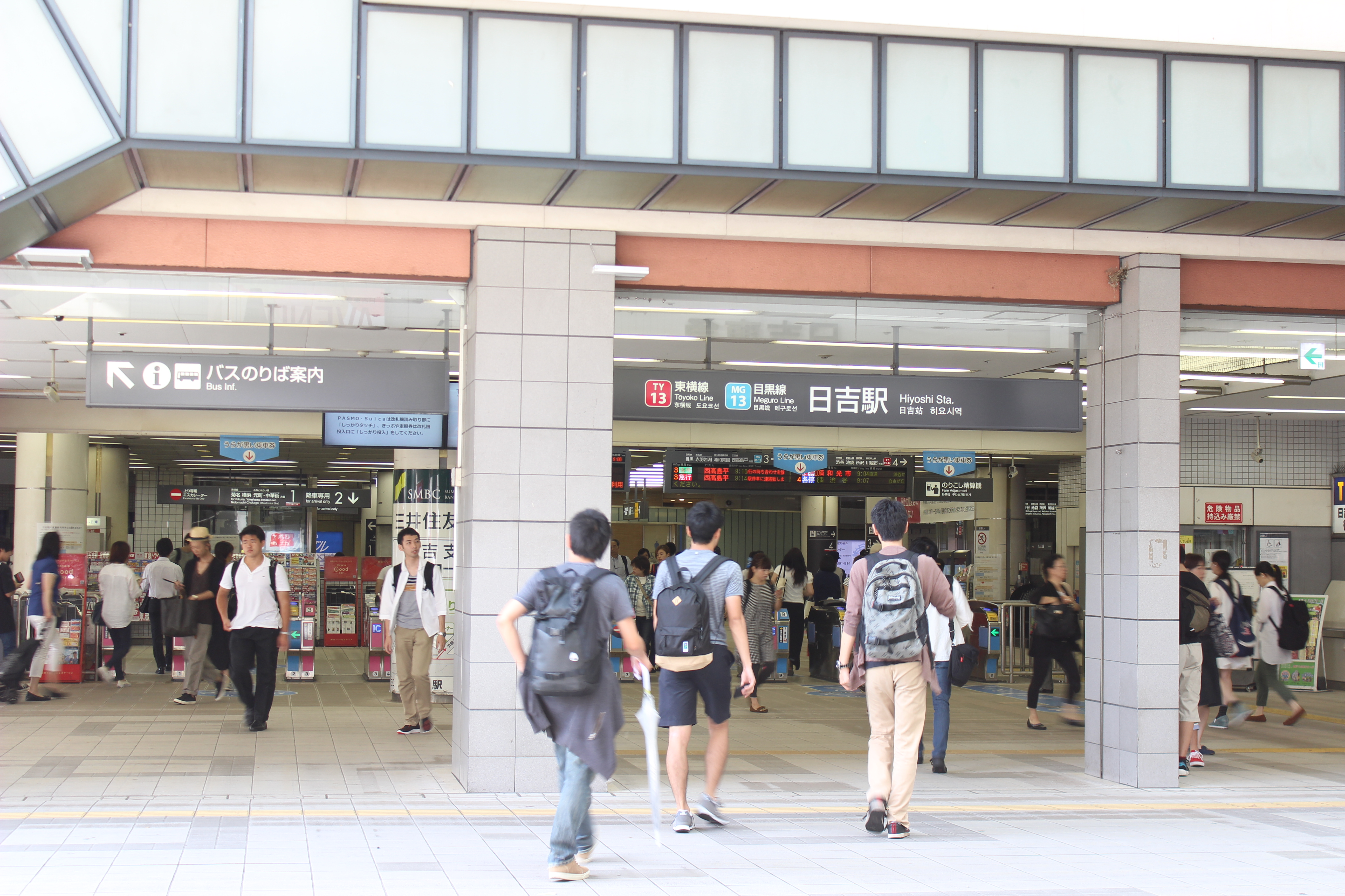 東急日吉駅中央改札口